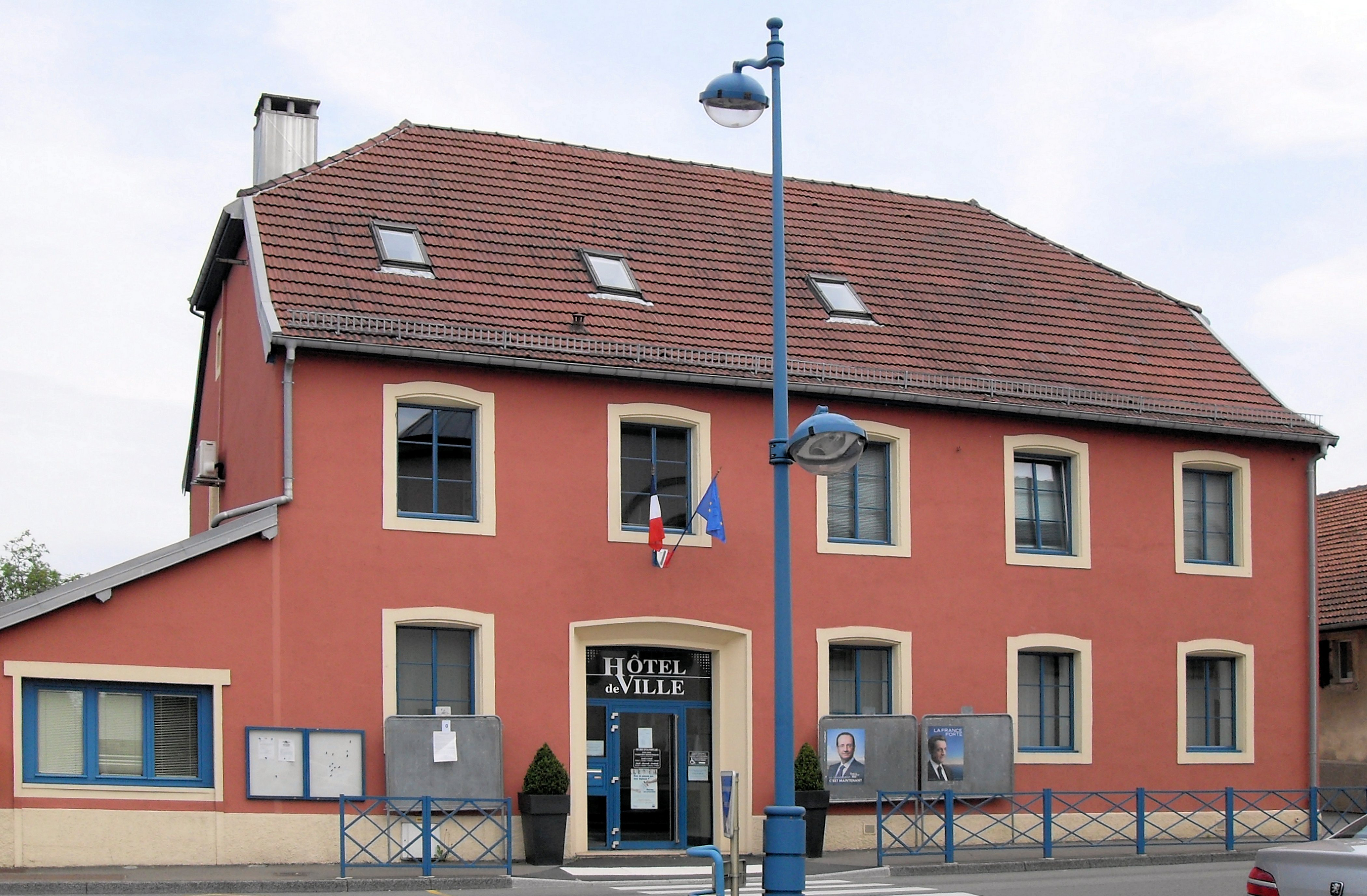 L'hôtel de ville de Grand-Charmont